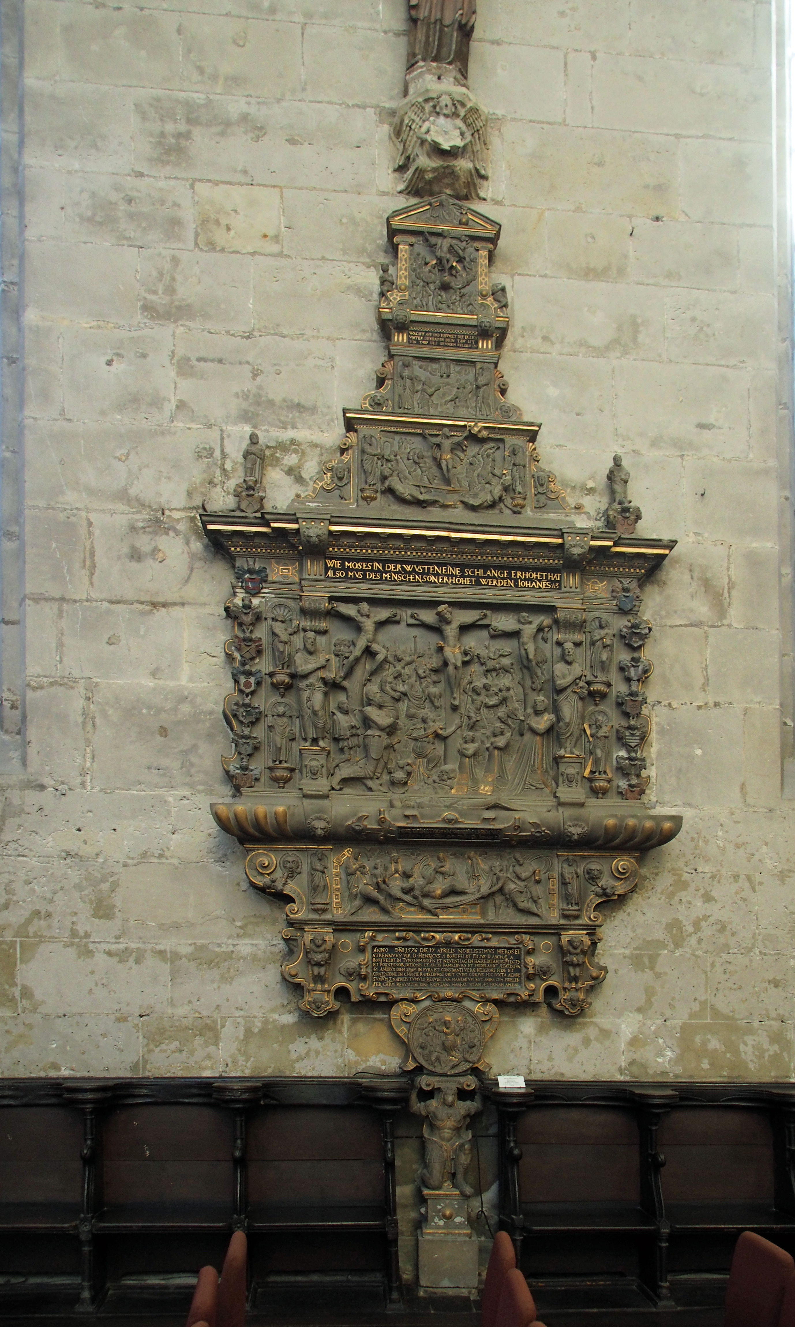 Renaissance-Epitaph des Freiherrn Heinrich von Bortfeld (1576), St. Benedikti, Quedlinburg, Sachsen-Anhalt